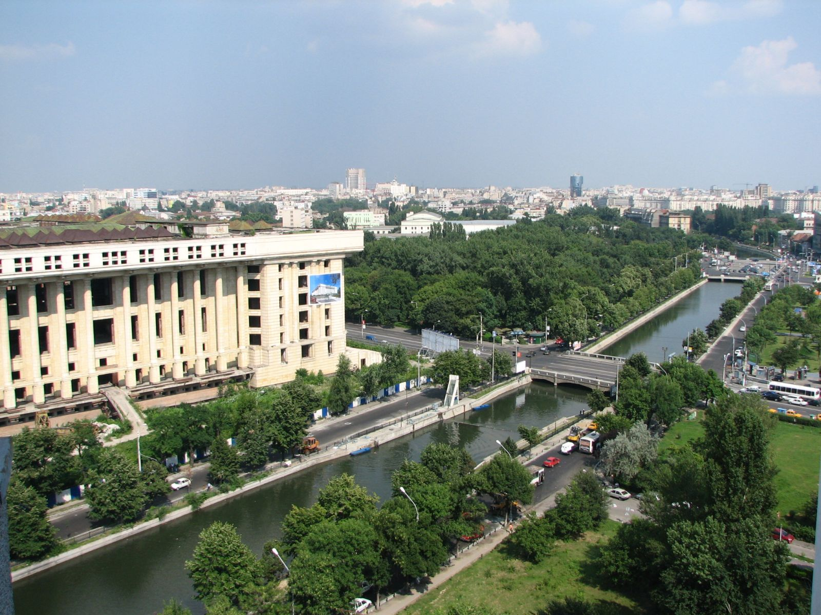 casa-radio-dambovita